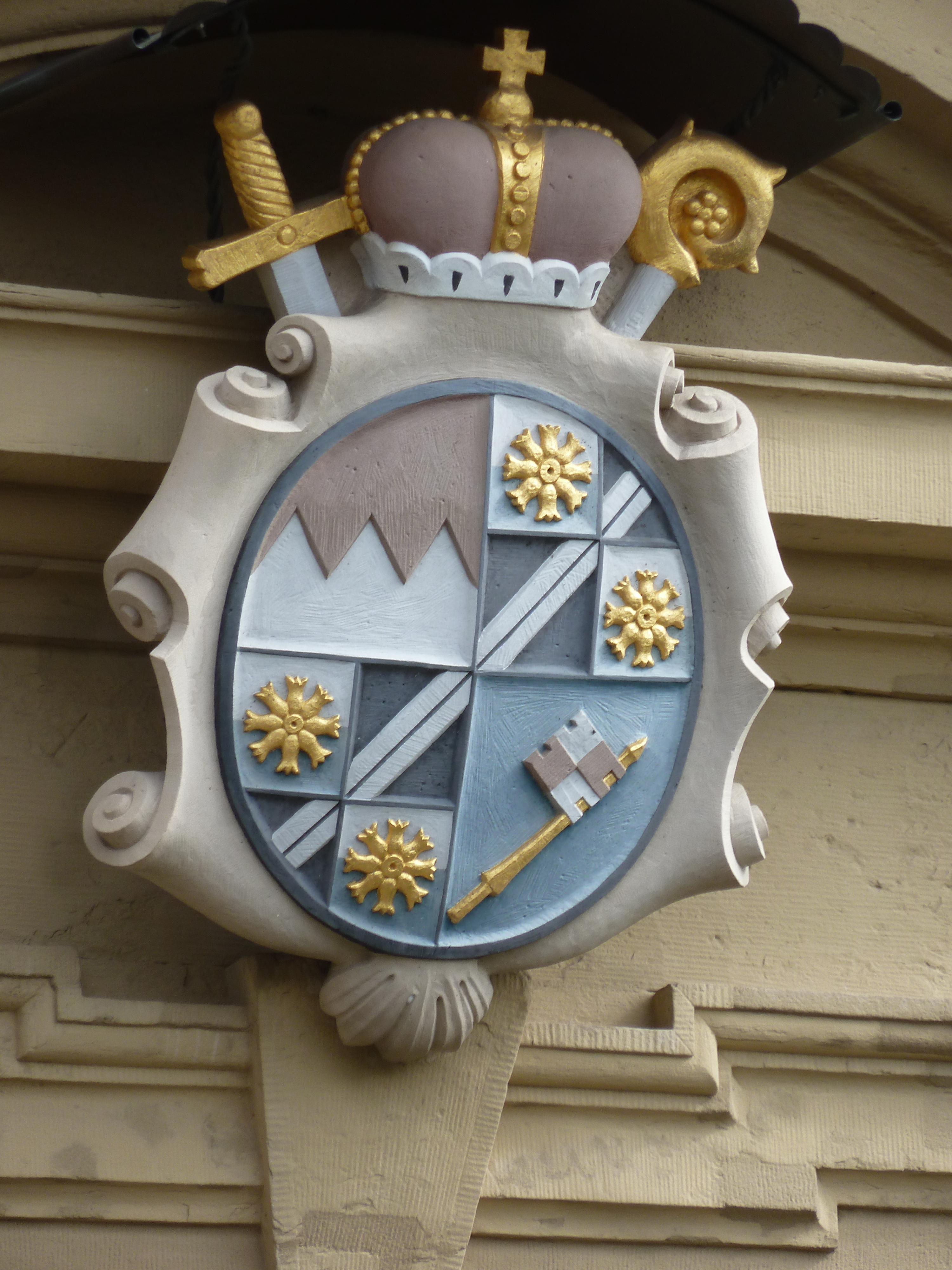 Fürstbischof v. Greiffenclaus Wappen am Südportal der Pfarrkirche St. Bonifatius, gelber Sandstein, farbig bemalt.